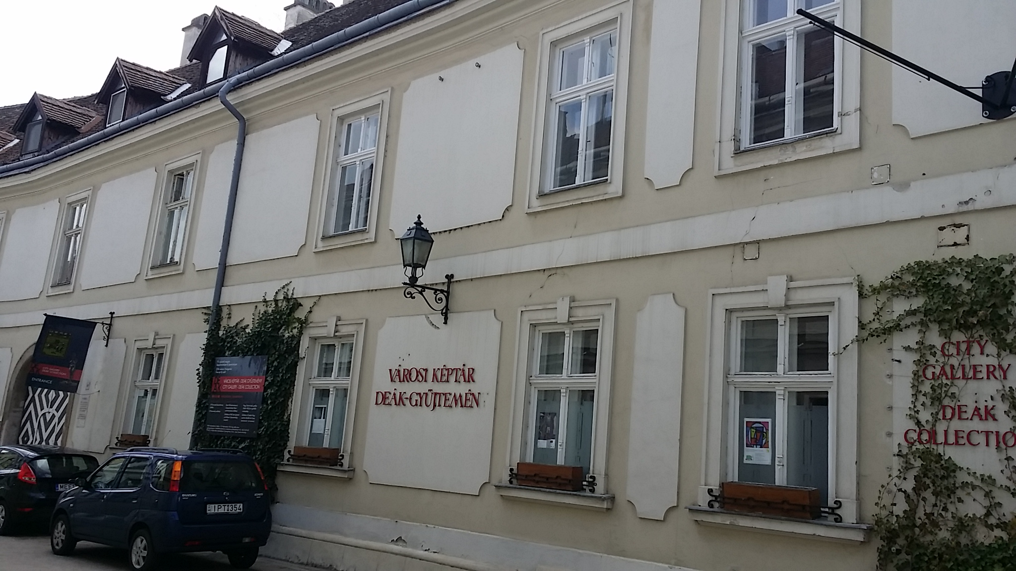 Székesfehérvár városi képtár